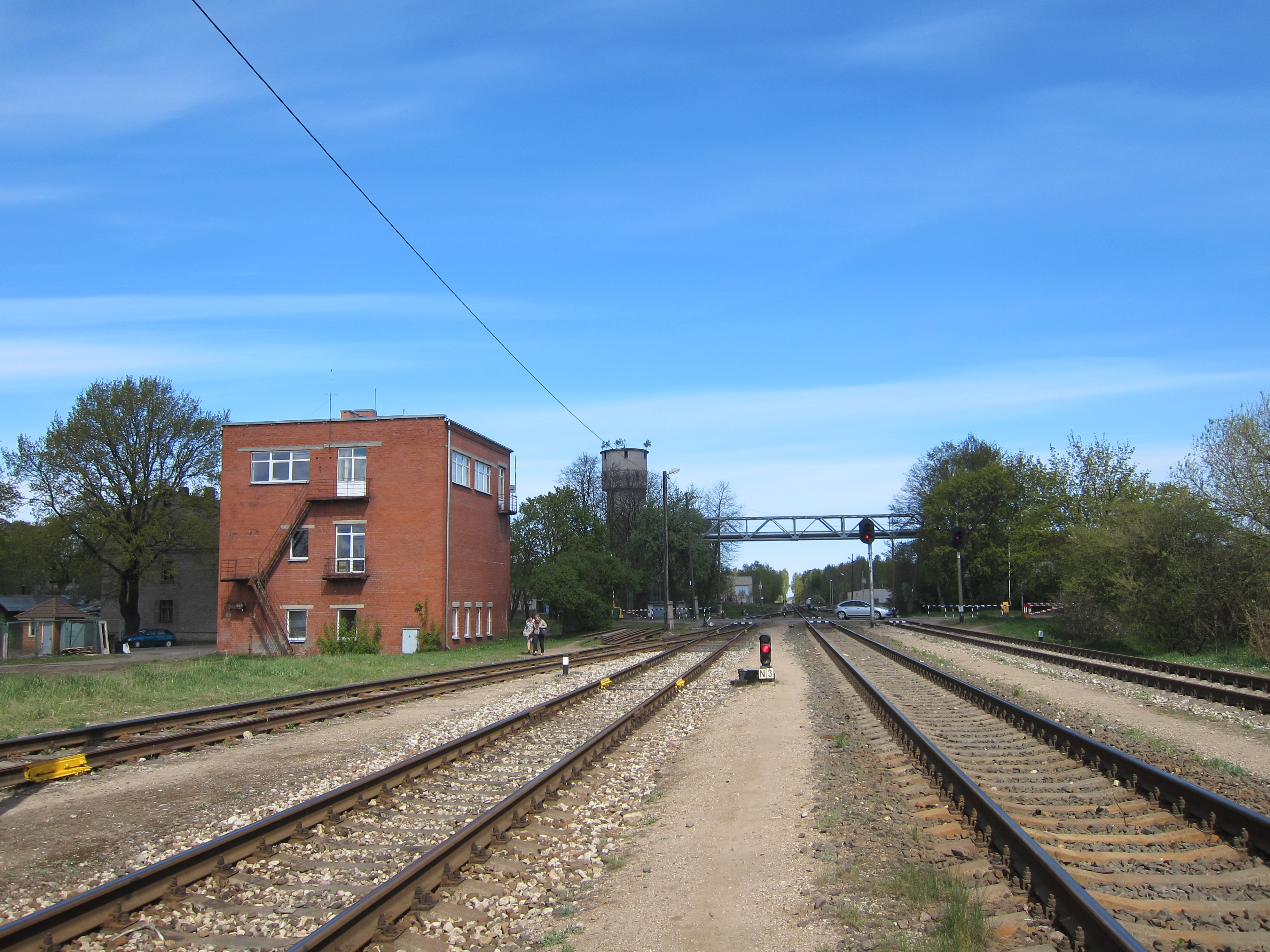 Lāčupes stacija